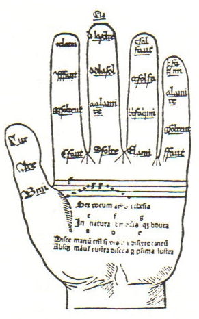 Foto: representação da Mão Guidoniana